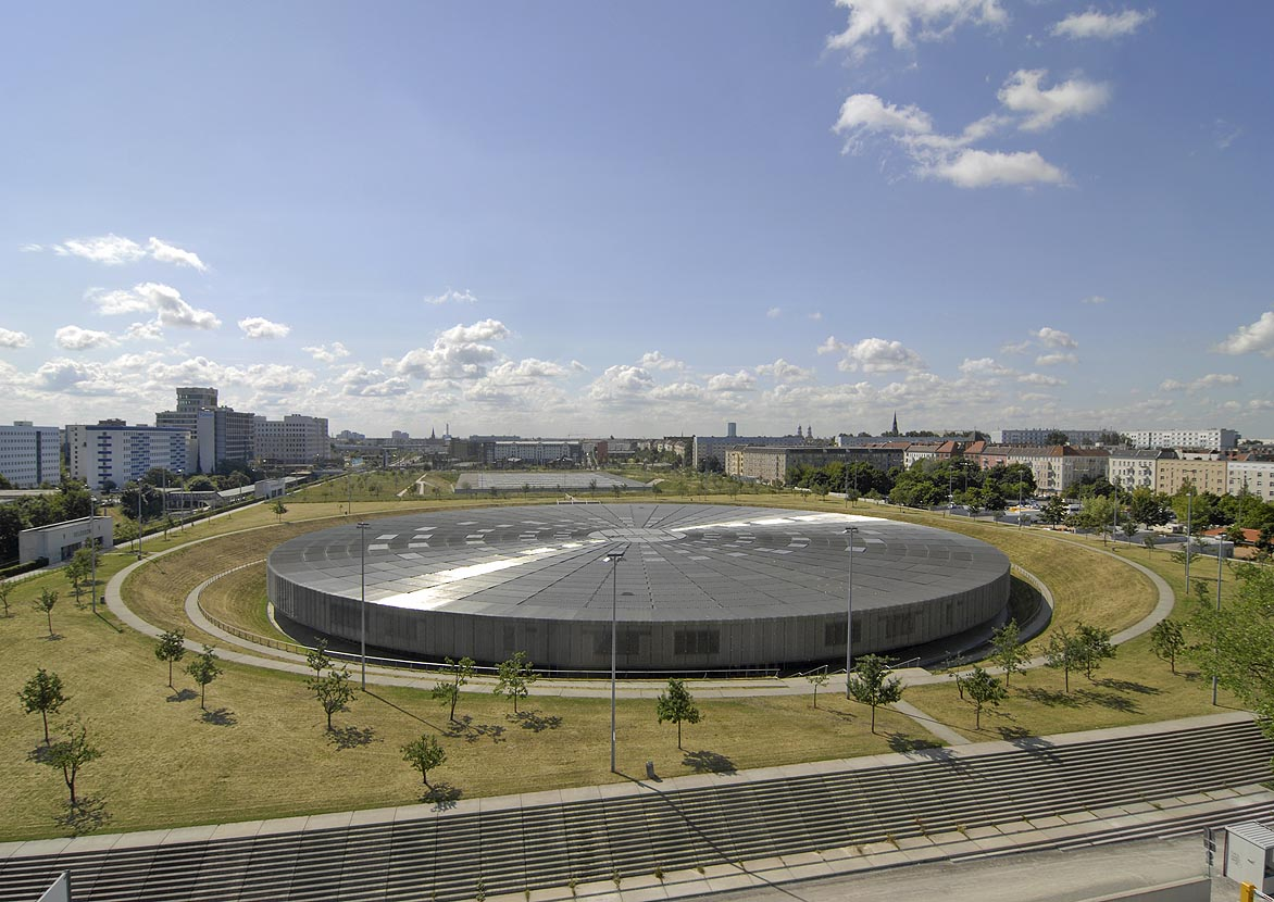 Die spektakuläre Dachansicht aus der Luft.